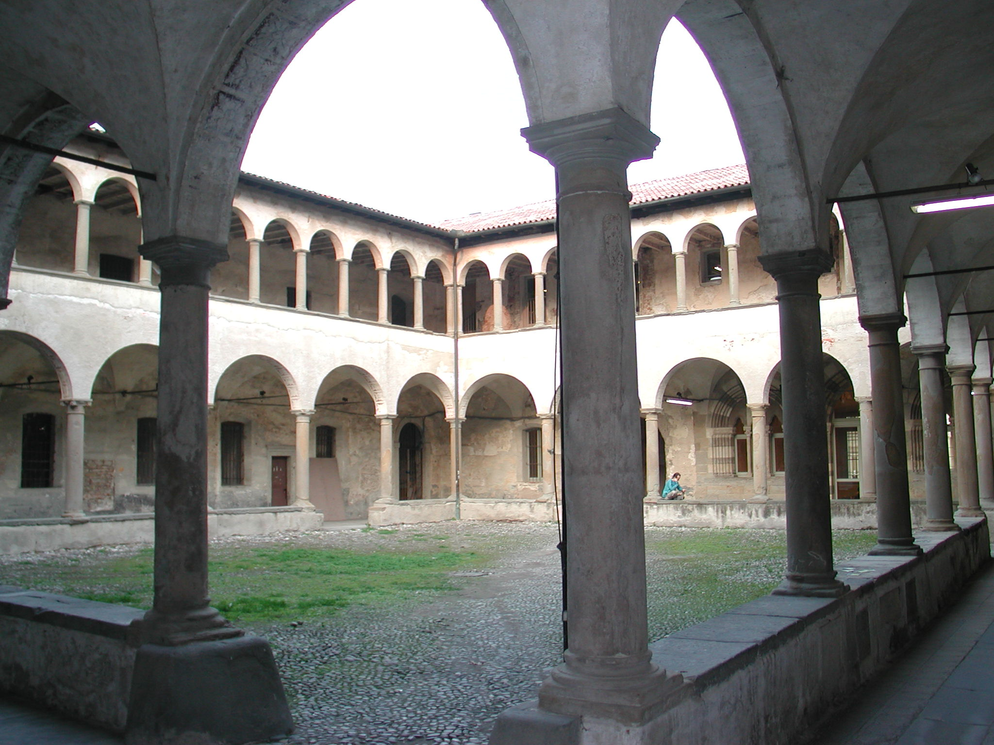 Bergamo, Lombardia, Italy Chiostri di sant'Agostino (ora università) - Cloister of Saint Augustine (now university) Foto fatta da me october 2005